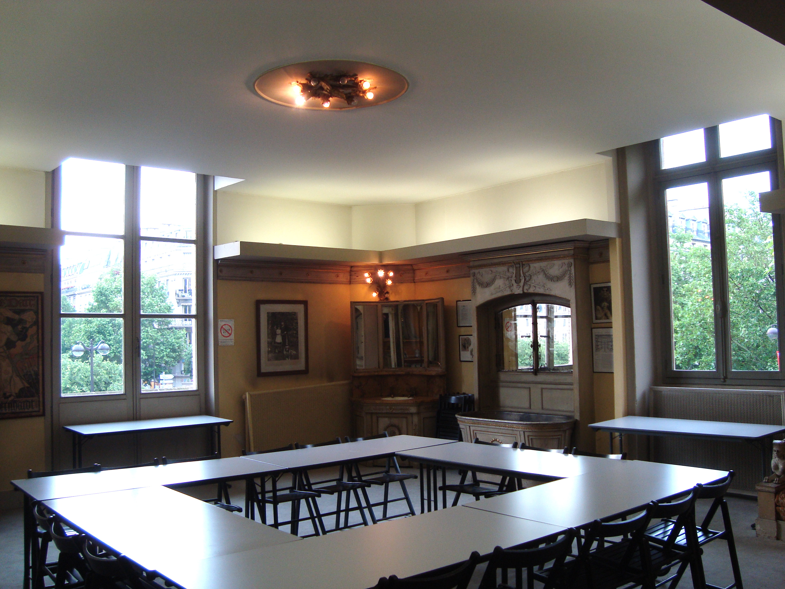 La loge de Sarah Bernhardt au Théâtre de la Ville à Paris, devenue aujourd'hui foyer du théâtre